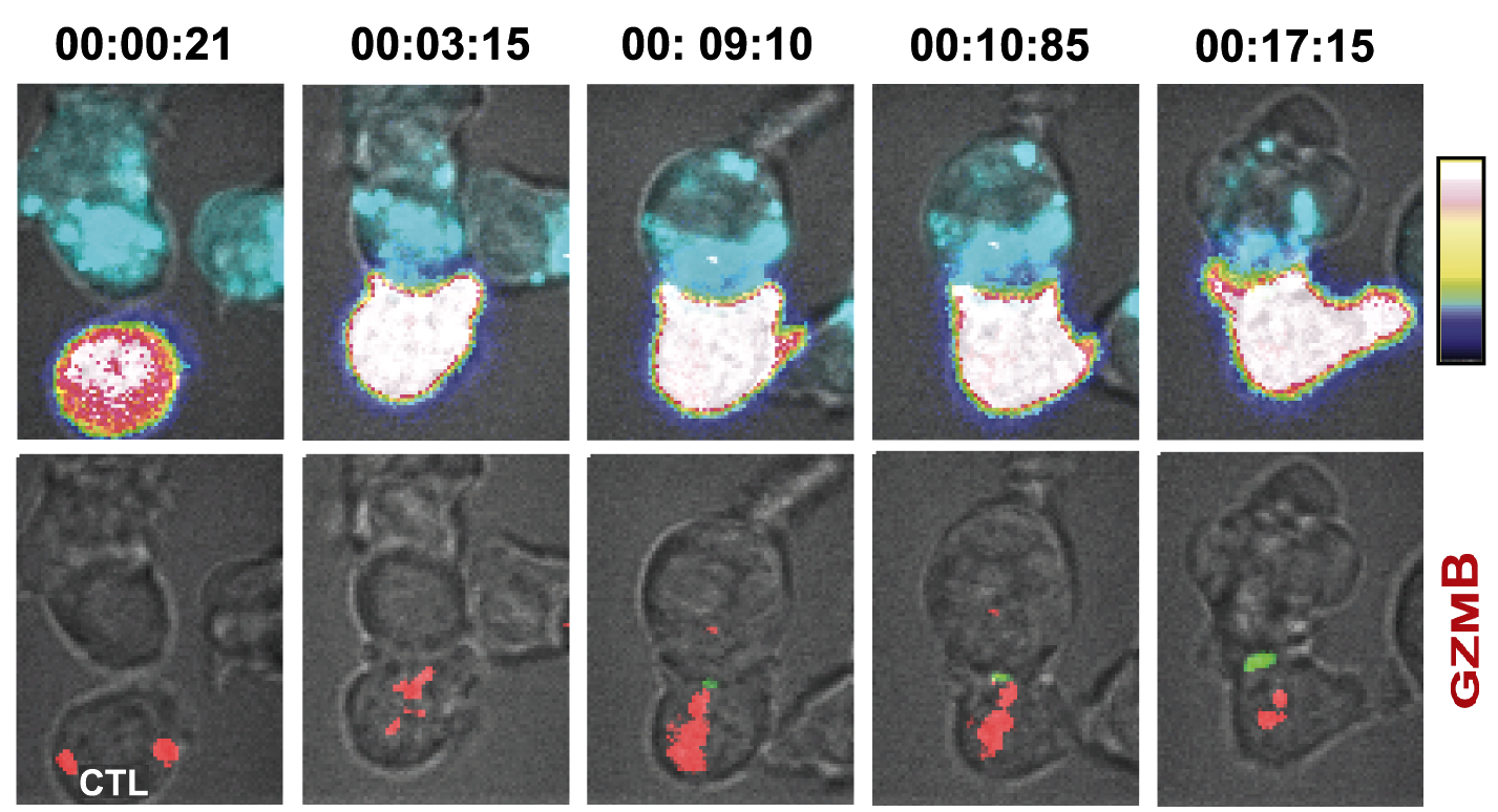 Figure 7A. Visualización de las cinéticas de activación del CTL, relocalización del gránulo y muerte de célula objetivo. Distribución de gránulos conteniendo GZMB en diferentes pasos de las interacciones CTL-objetivo. Las imágenes muestran el mismo linfocito T citotóxico CTL (en la parte baja de ambas series de fotos) en contacto con una célula objetivo. Las señales fluorescentes de granzimaB se observan (en rojo) sobre las imágenes de campo brillante (en la serie inferior). A partir de 3 min 15 segs existe una asociación estrecha (sinapsis) entre CTL y célula objetivo, y una polarización progresiva de los gránulos de GZMB (en rojo) hacia el centro de la sinapsis de contacto.